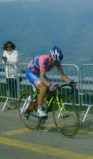 Le coureur cycliste Damiano Cunego lors de la quatorzième étape du Tour de France 2011. Je remercie [-OMAR-BRAVO-], auteur de la photo, de m'avoir permis de la mettre sur le site Wikimédia Commons.